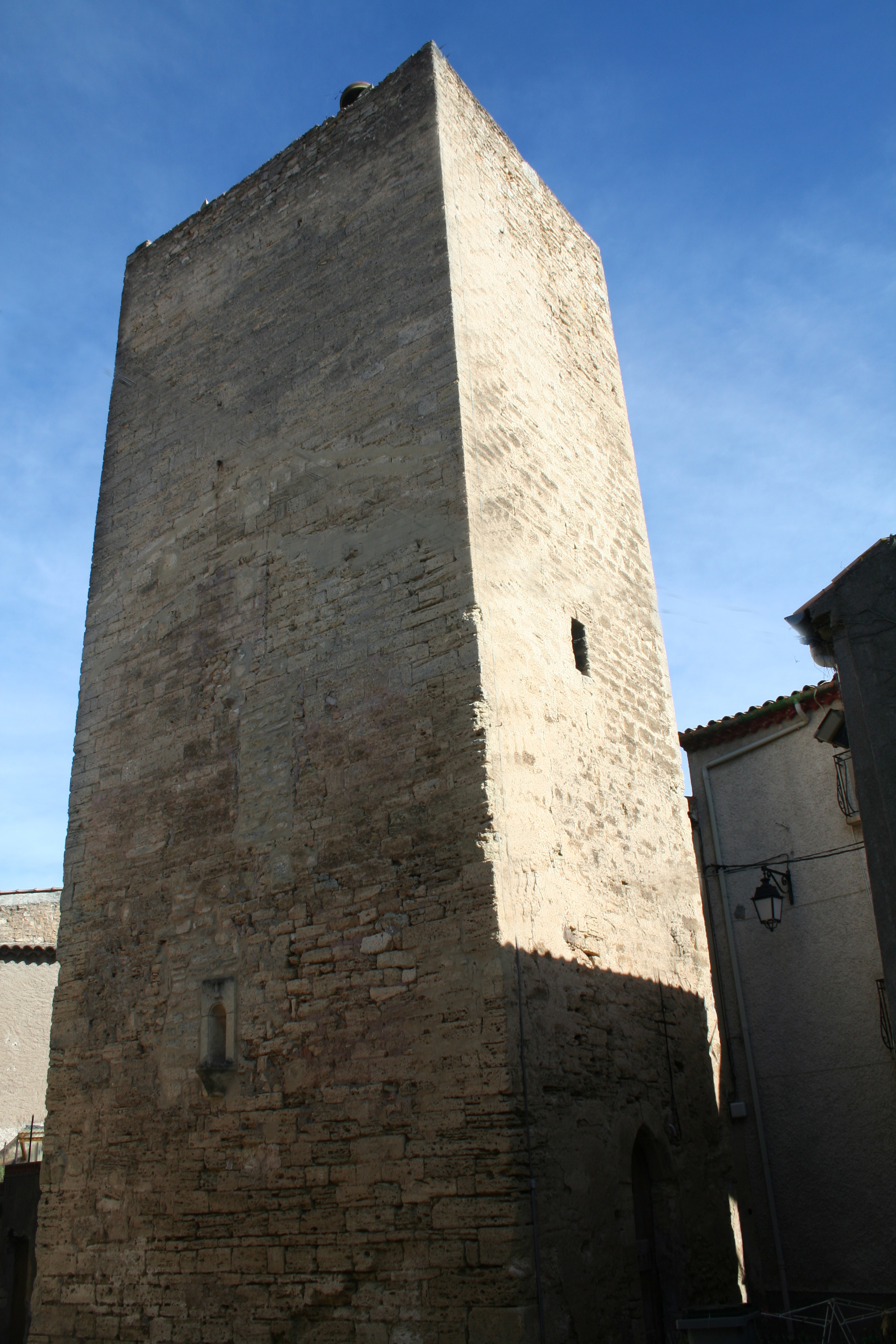 Alignan-du-Vent (Hérault) - Tour.